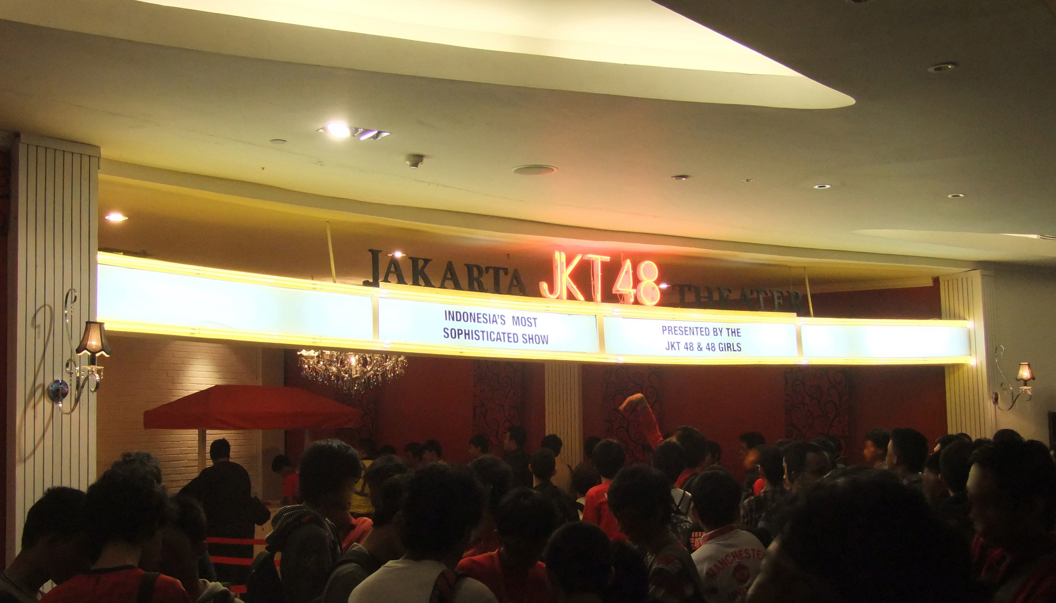 JKT48劇場Bahasa Indonesia: Teater JKT48, fX Sudirman, Jakarta